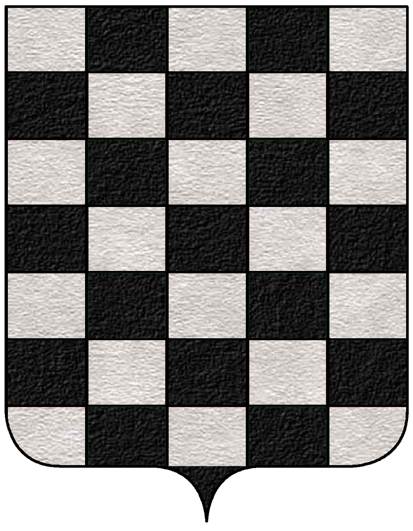 Stemma della famiglia Pépoli (Bologna). Un suo ramo fu ammesso anche al patriziato di Venezia.